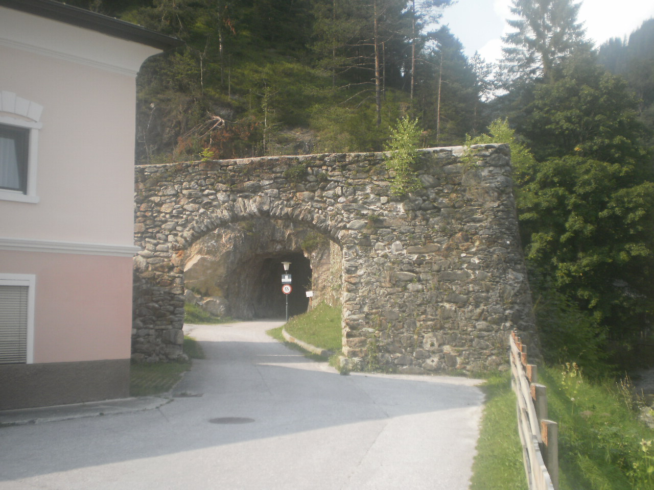 Festungsanlage, Pass Mandling. Tor- und Tunneldurchbruch aus dem Jahr 1941. Der Torbogen steht auf GstNr. 807/3, die Mauer rechts zum Mandlingbach (nur Stirnseite im Bild) steht auf GstNr. 6/2, beides unter Denkmalschutz.